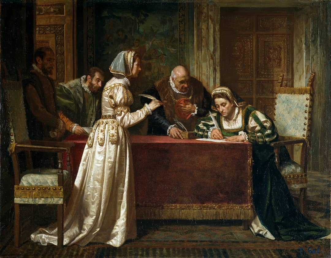 Cuadro de Francisco Jover y Casanova, en el que se representa la firma del Tratado de Cambrai o "Paz de las Damas" (5 de agosto de 1529). Las encargadas de rubricar el acuerdo fueron Margarita de Austria, tía de Carlos V y Luisa de Saboya, madre de Francisco I de Francia.